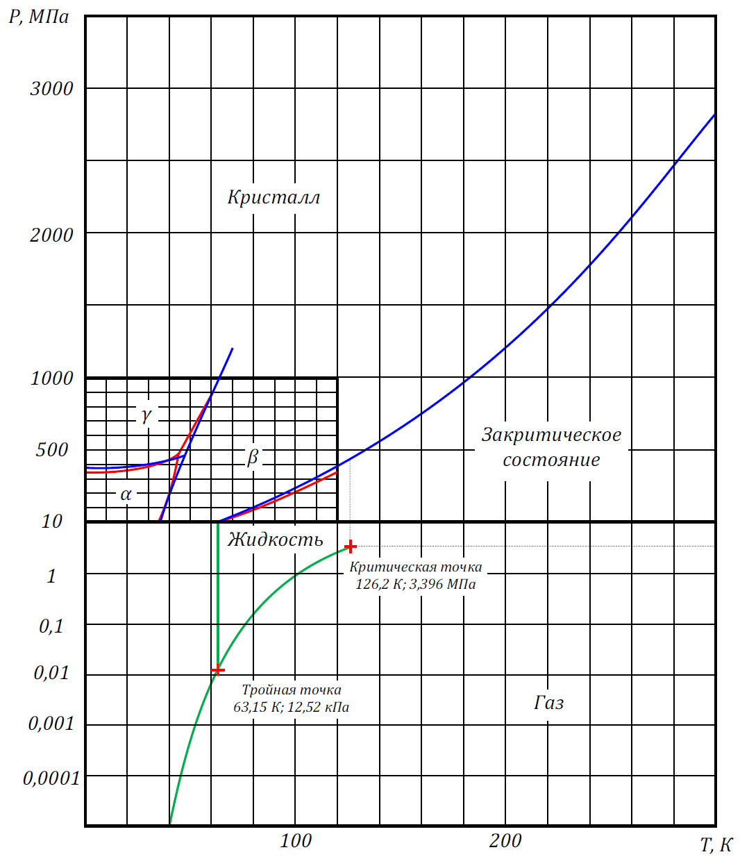 Фазовая диаграмма азота. Верхняя часть диаграммы (область высоких давлений) имеет линейный масштаб по вертикальной оси, нижняя (область малых давлений) — логарифмический. Красная и синяя линии — по данным Phase Diagrams of the Elements, David A. Young, UCRL-51902 "Prepared for the U.S. Energy Research & Development Administration under contract No. W-7405-Eng-48". Зелёная линия — по данным Selected Aspects of Manufacturing and Strength Evaluation of Porous Composites Based on Numerical Simulations, Wiesław Frącz, Grzegorz Janowski, Grażyna Ryzińska.